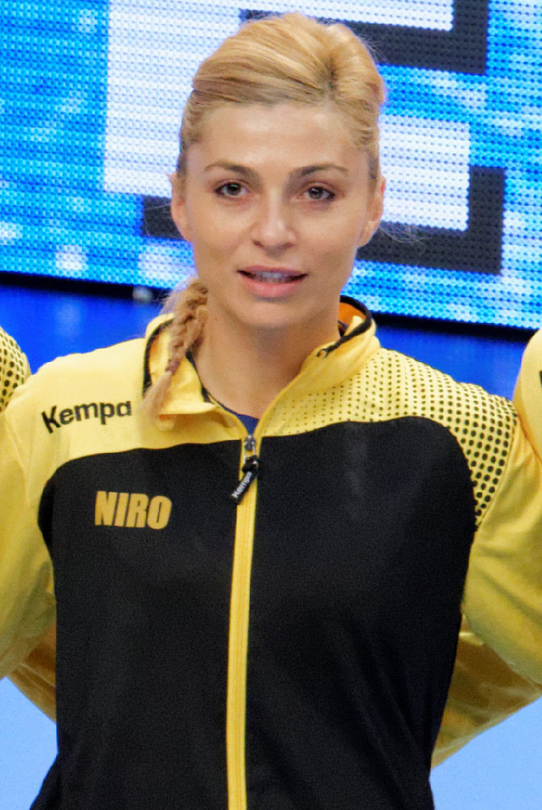 Adriana Nechita lors du TIPIFF du 29 novembre 2015. A Coubertin (Paris).